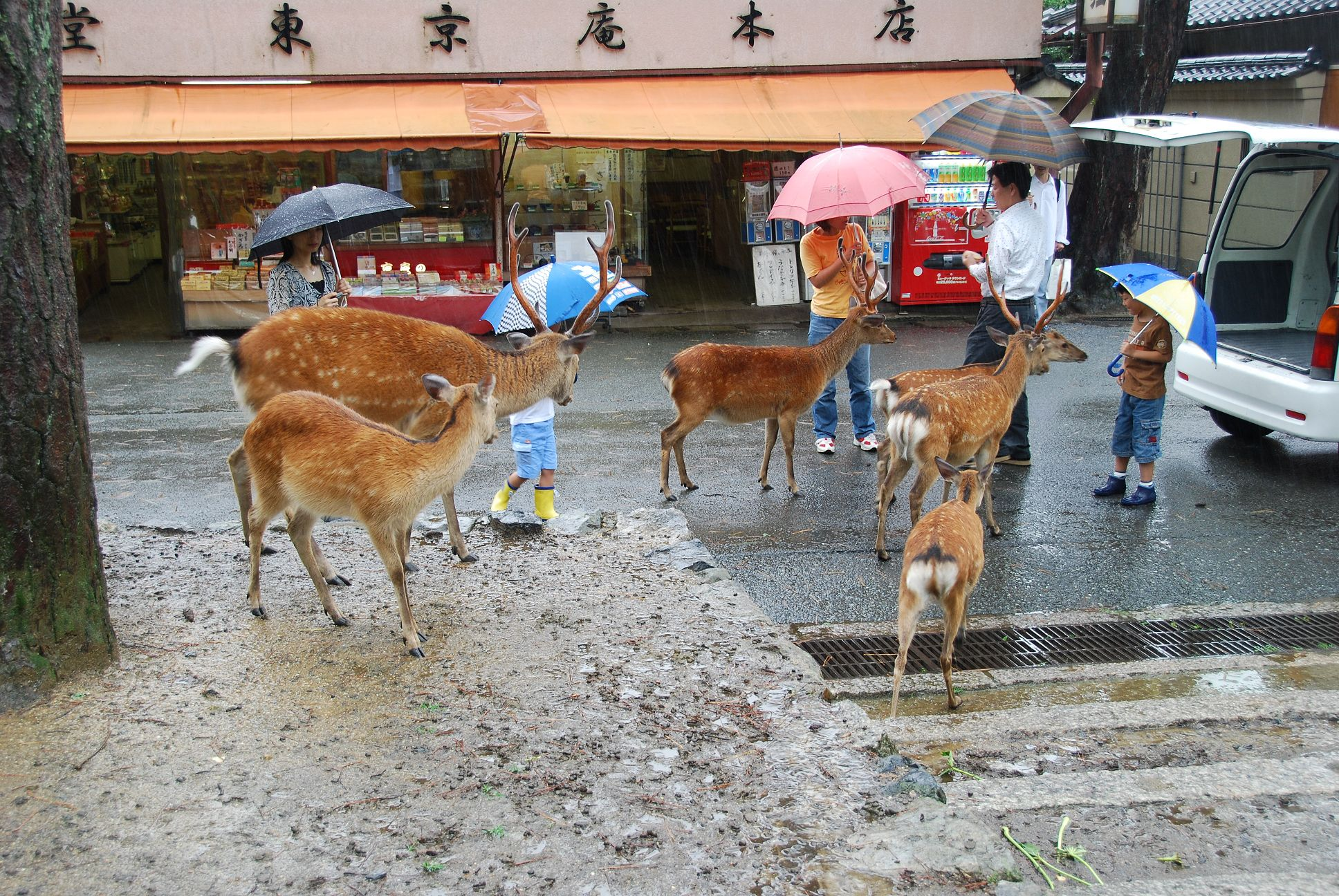 Kasuganocho, Nara, Nara Prefecture 630-8212, Japan